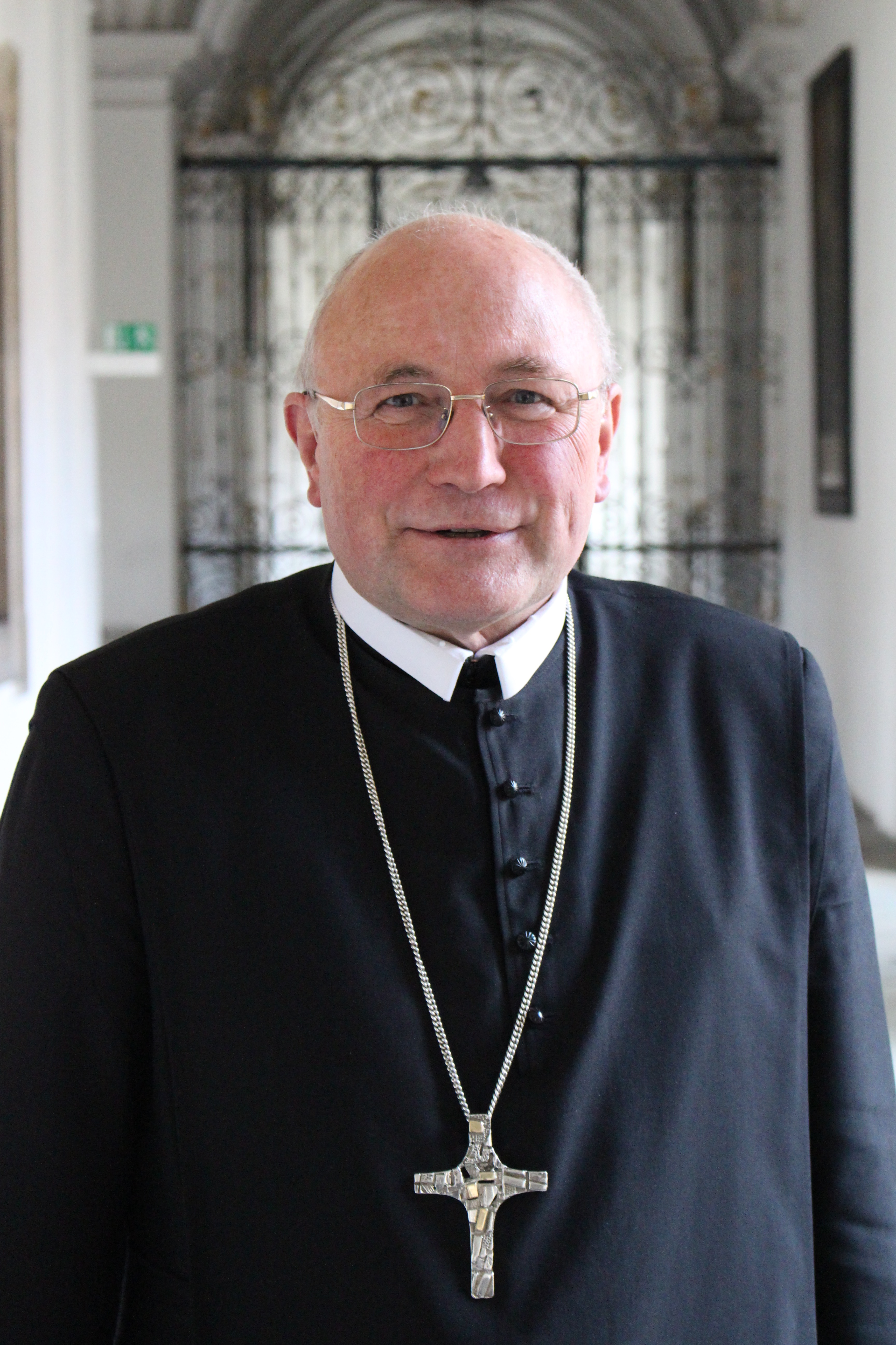 Porträtfoto von Abt Benedikt Plank OSB